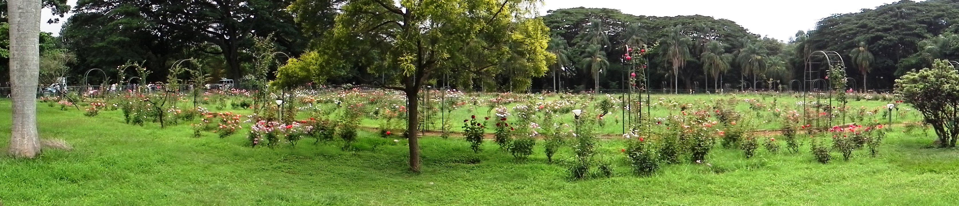 ബെംഗളൂരിലെ ലാൽ‌ബാഗിലെ റോസ് ഗാർഡൻ ഒരു പനോരമ ദൃശ്യം